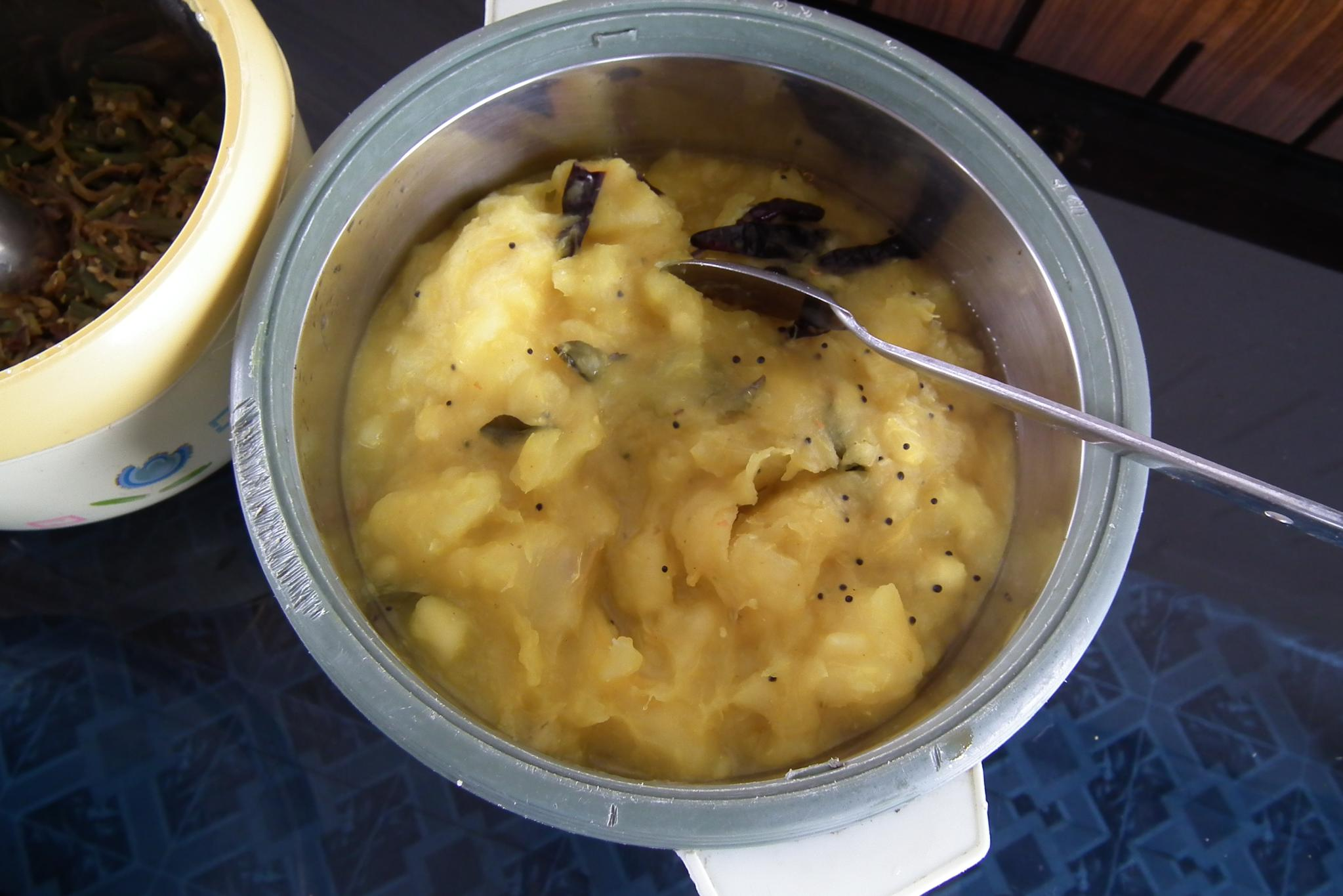 Kerala Tapioca boiled